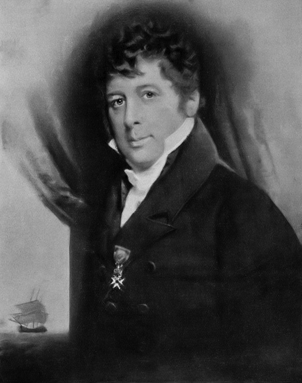 Hendrik Doeff oil on canvas 73 x 61 cm